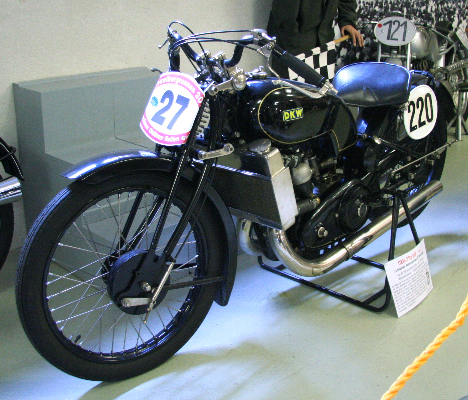 DKW Rennmaschine aus der Basisversion ZSW 500 entwickelt, DKW PRe 500, ca. 36 PS bei 5500 U/min, 3-Gang-Handschaltung, ca. 160 km/h, Baujahr 1929, im Museum für sächsische Fahrzeuge in Chemnitz.